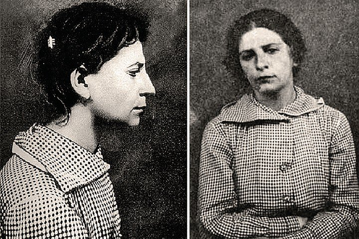 Фейга Хаимовна Ройдман-Ройтман-Ройтблат - Фанни Ефимовна Каплан